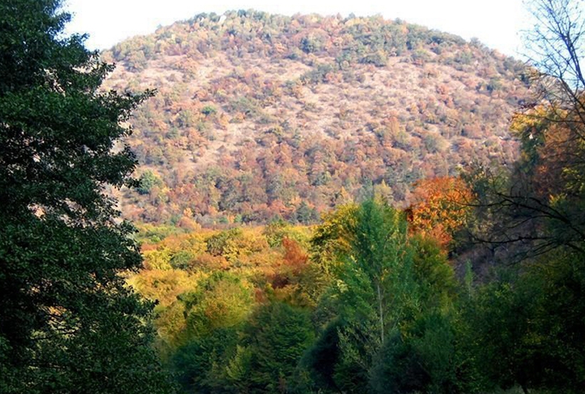 Szádvár Szögliget felől.